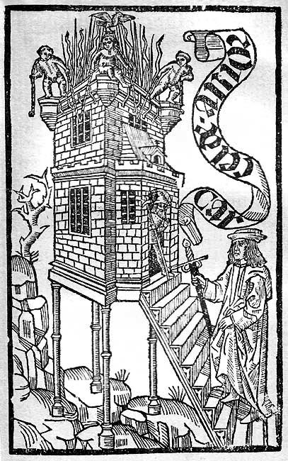 Gravat del llibre Lo càrcer d'amor, Barcelona, Joan Rosembach 1493